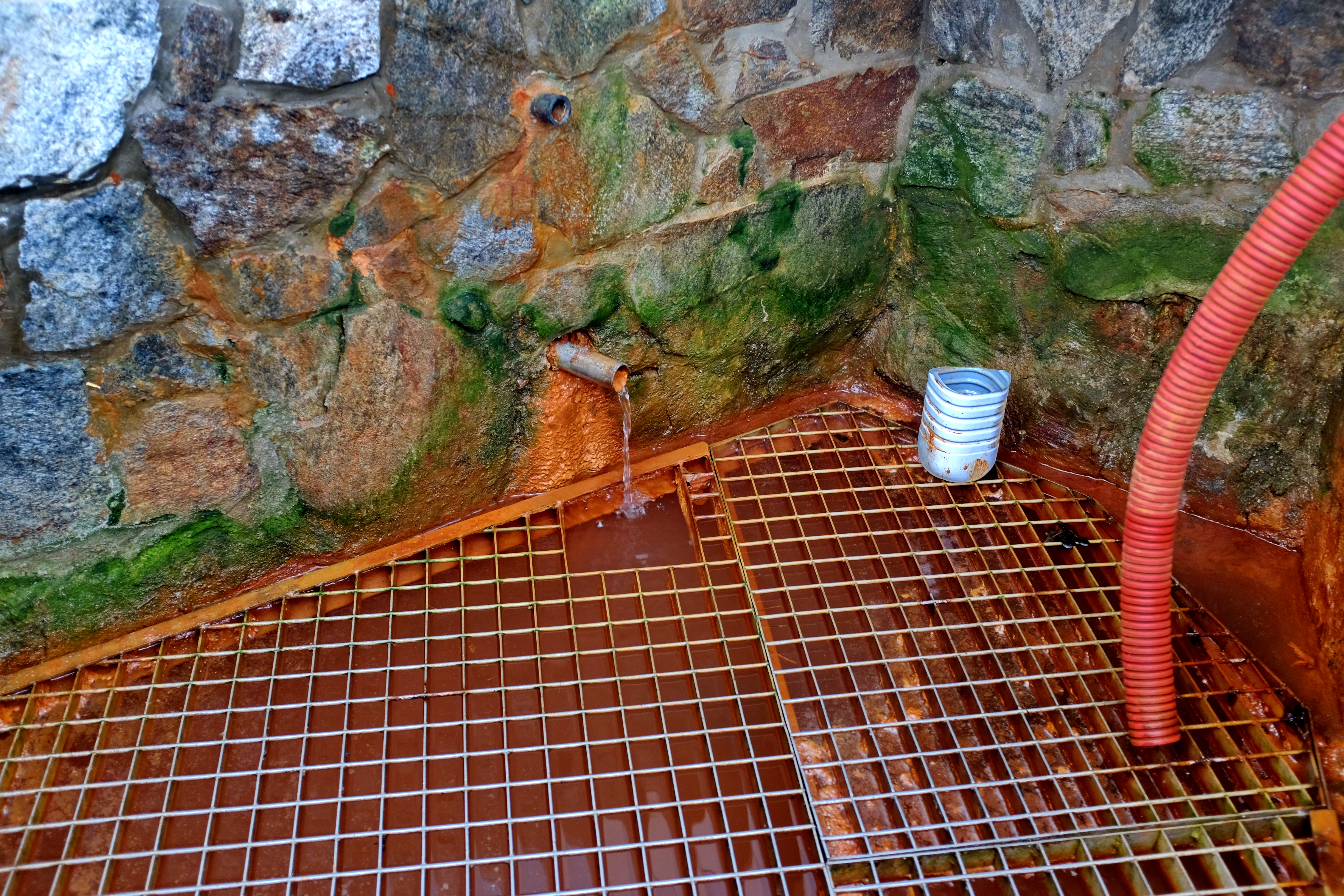 Doubrava, místní část města Aš, minerální pramen ve vesnici, Smrčiny, okres Cheb